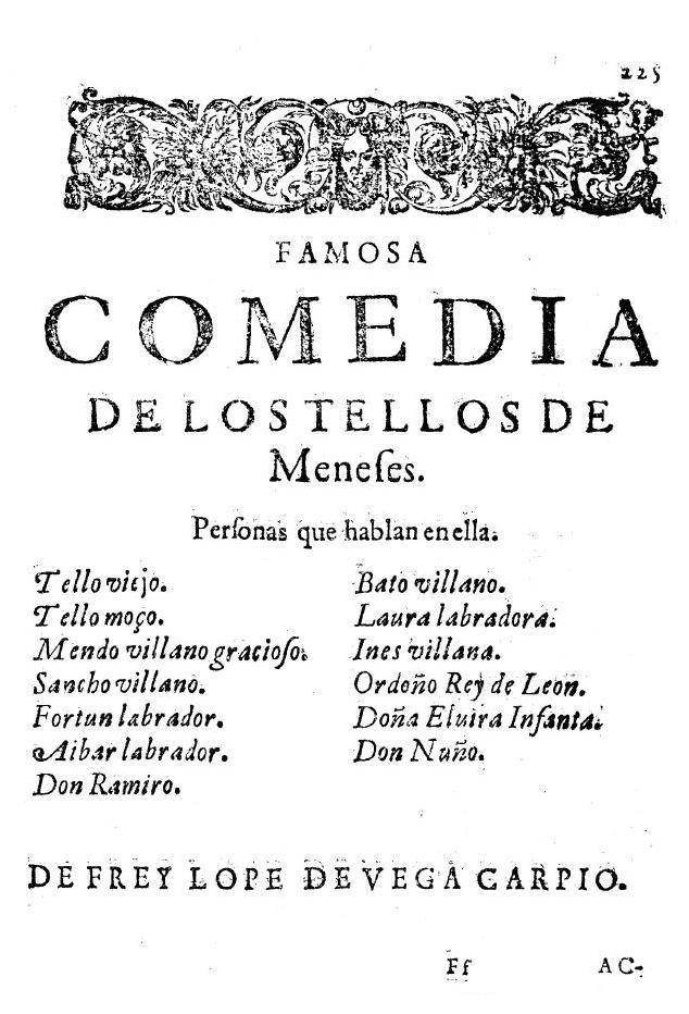 Los Tellos de Meneses (primera página)